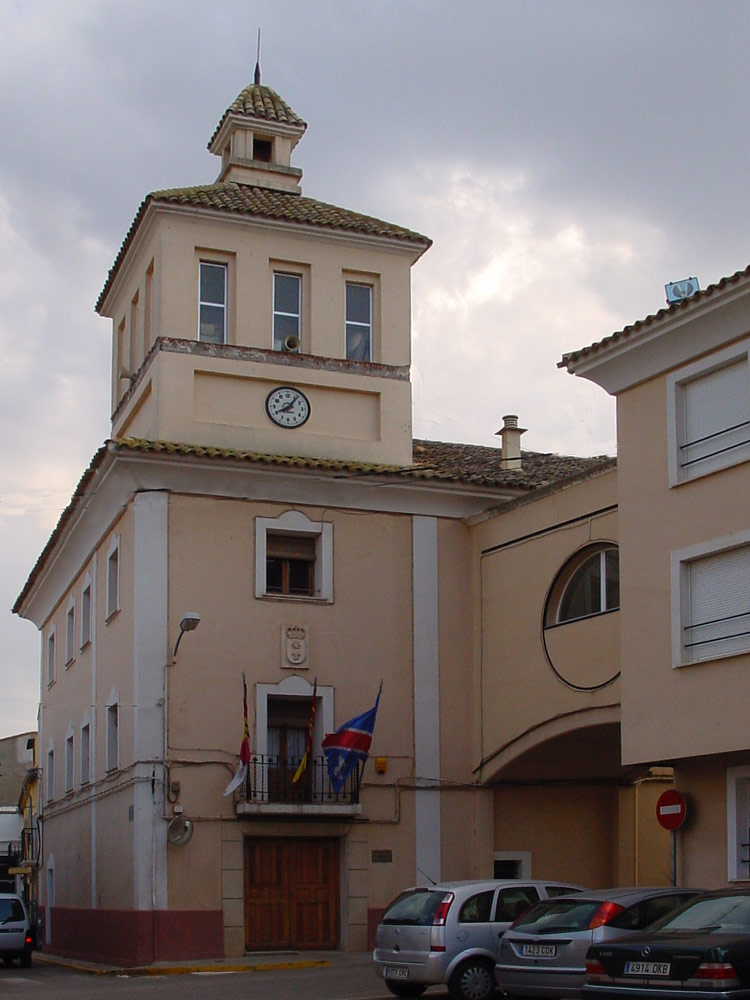 Ayuntamiento de Motilla del Palancar, en Cuenca (España)